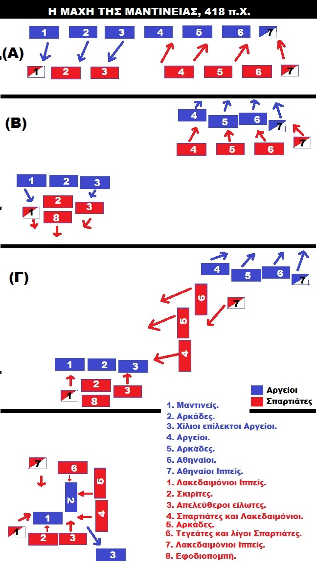 Παράταξη στρατευμάτων Μάχης Μαντίνειας, 418 π.Χ.